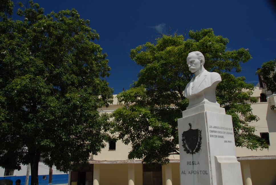 Cuba, augustus 2006, info in de Metadata